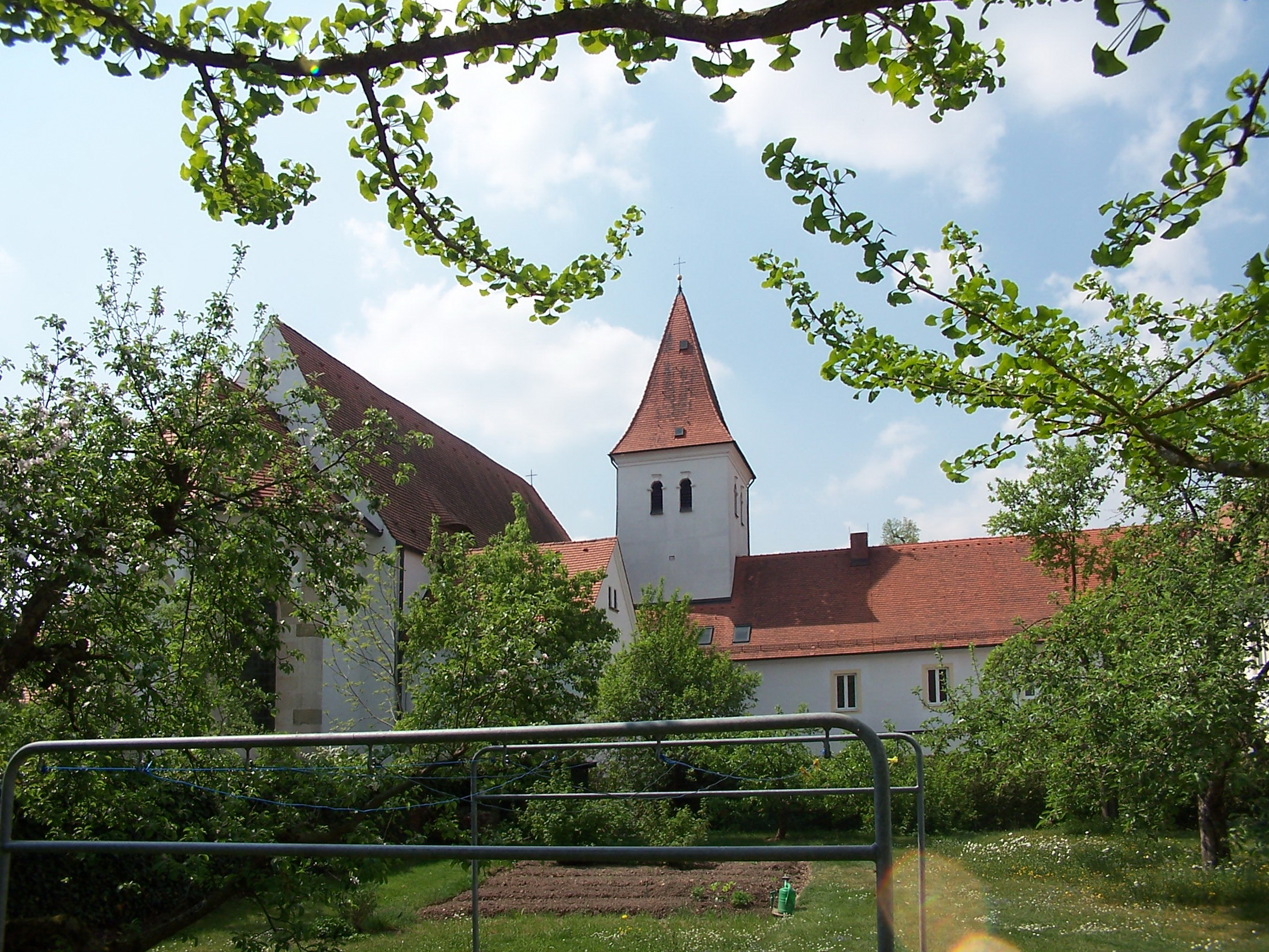 Langquaid, Paring 1. Katholische Pfarrkirche, ehem. Augustinerchorherren-Stiftskirche St. Michael.